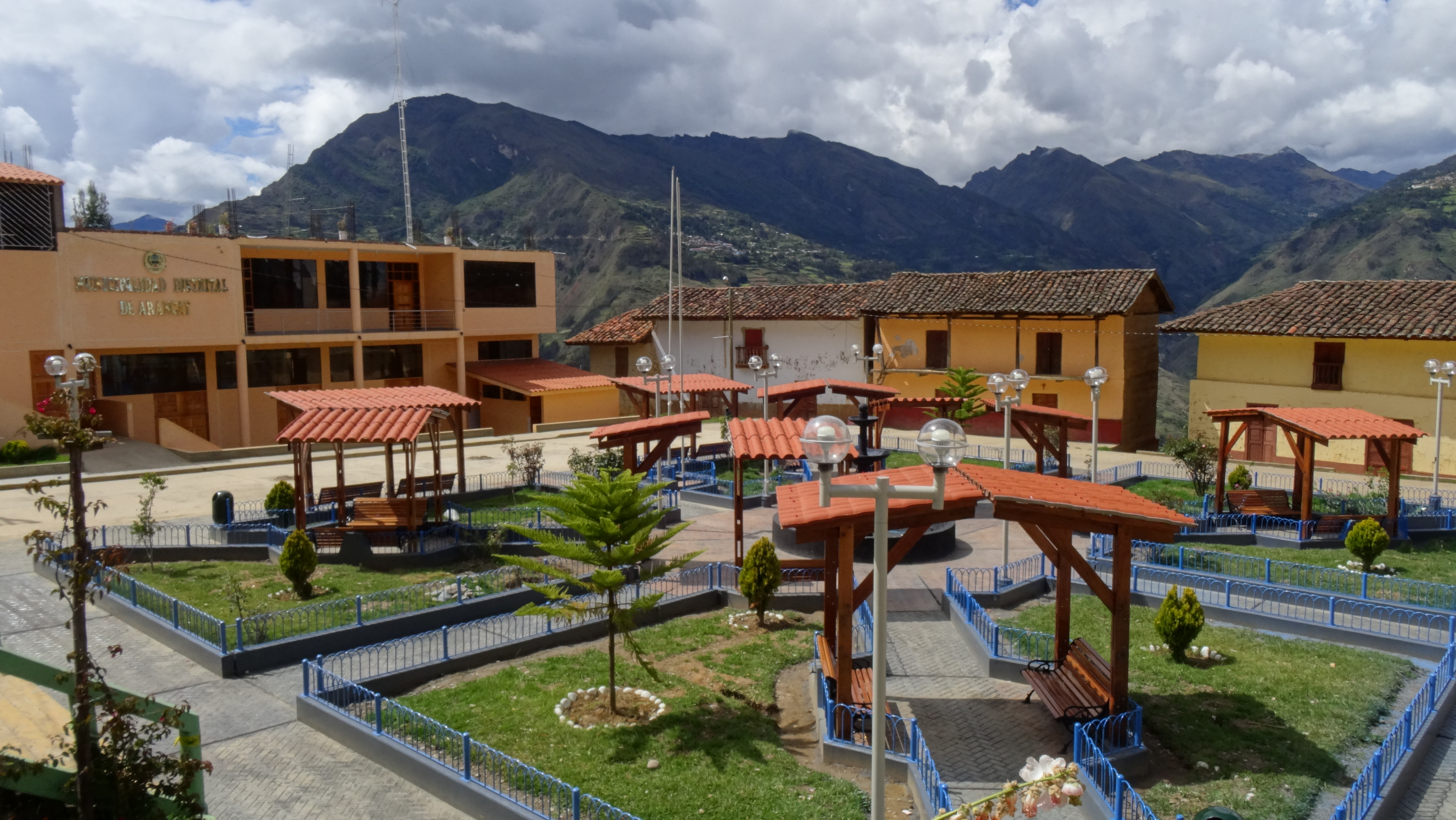 Plaza de Armas y la municipalidad a la superior izquierda.